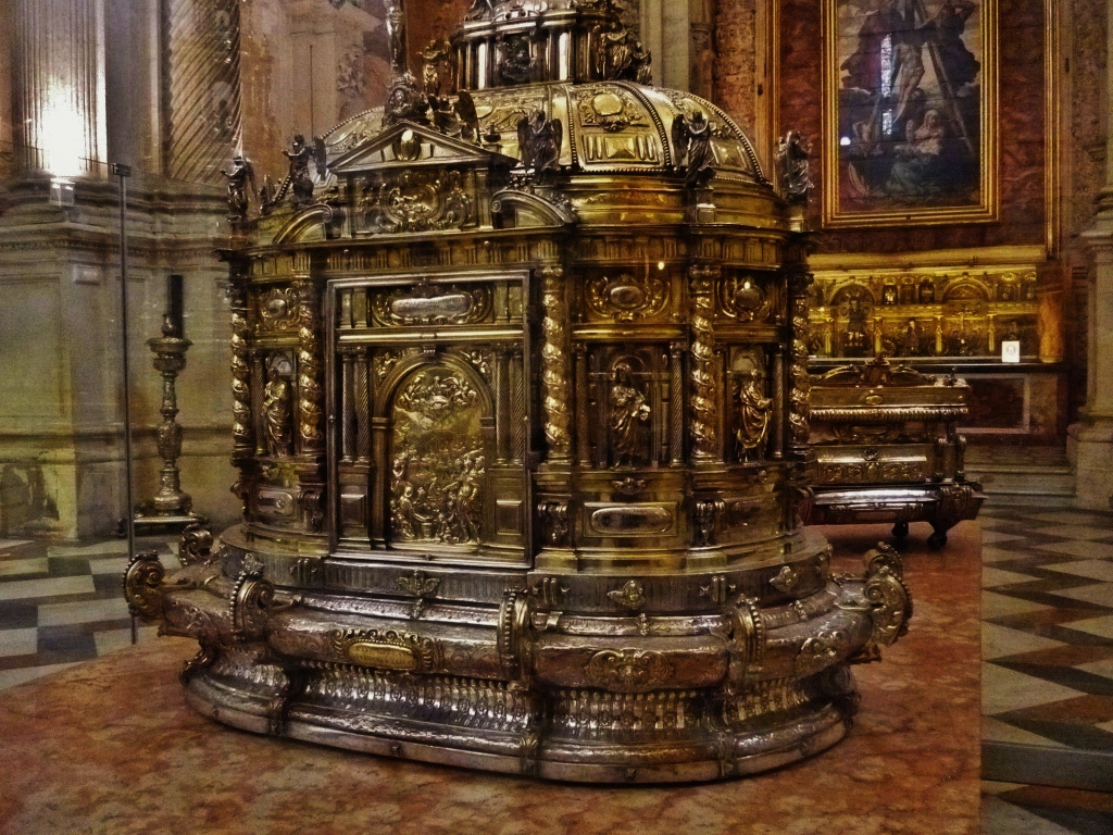 Sagrario del retablo mayor de la catedral de Sevilla. Fue realizado por el orfebre Francisco de Alfaro en plata en su color y sobredorada entre los años 1593 y 1598. Y en su estructura de planta ovalada destacan las columnas salomónicas que aluden al templo de Jerusalén.